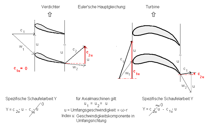 Dreiecke-Turbine